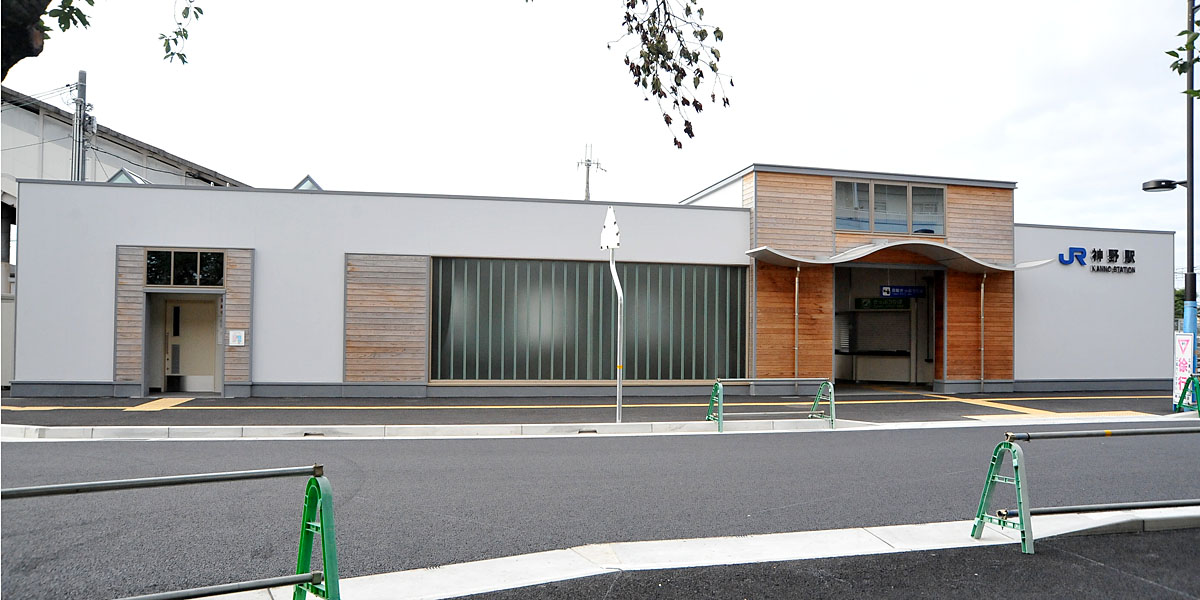 神野駅の北側に出来た改札口。